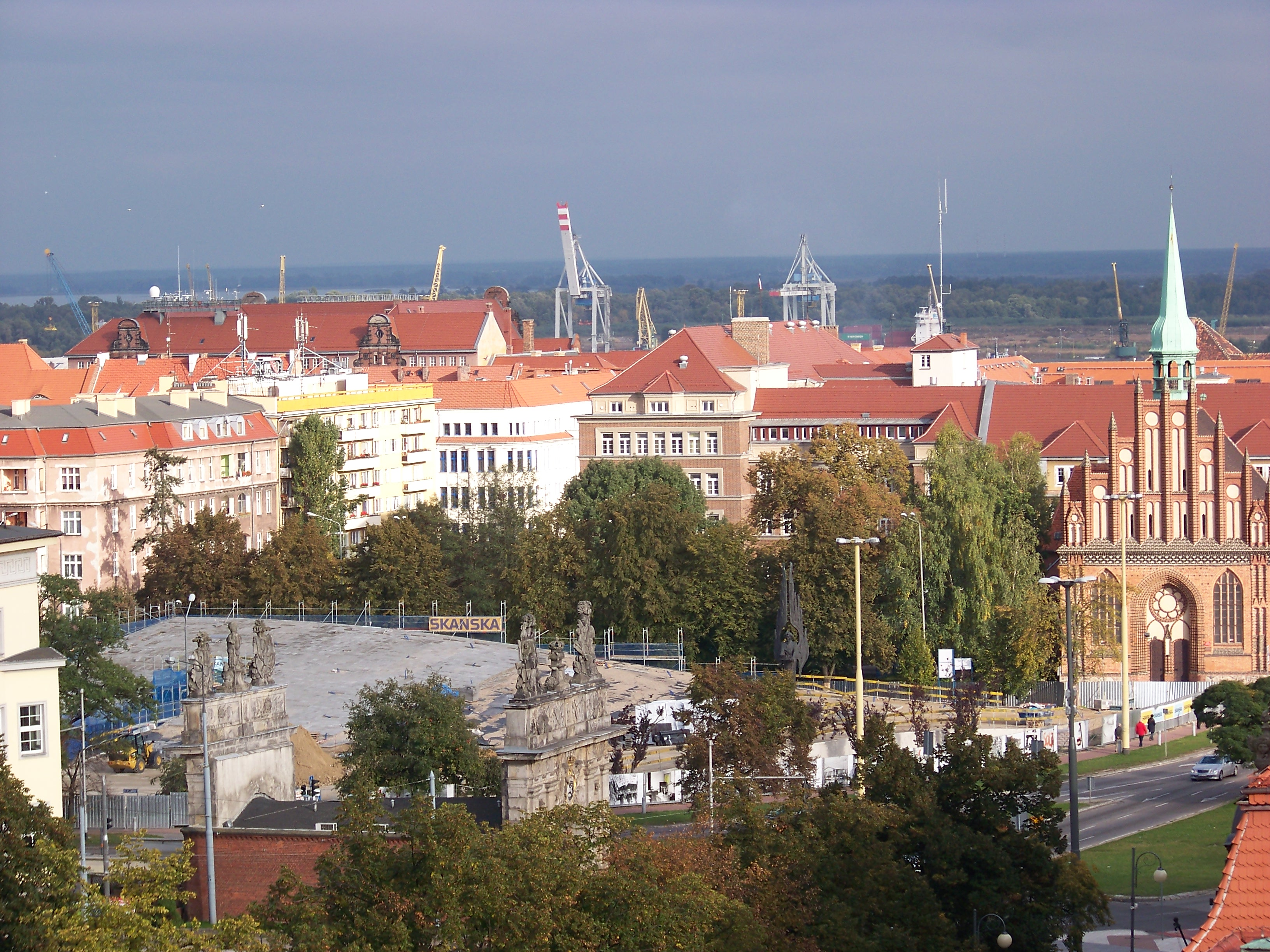 Szczecin, budowa Centrum Dialogu „Przełomy” w październiku 2013 r.